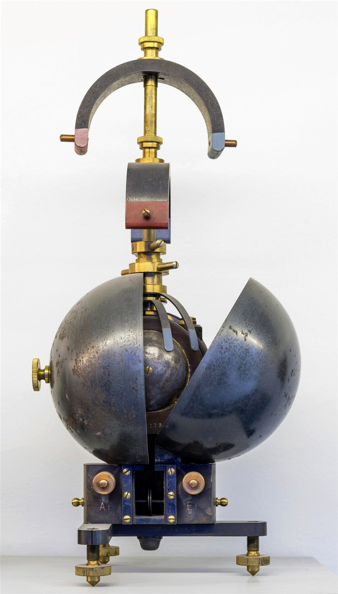 Kugelpanzer-Galvanometer, Siemens & Halske Inventarnummer: 2438 Hersteller: Siemens & Halske Datum: um 1900 Objektmaß (H x B x L/T): 345 x 125 x 140 mm Masse: 4,005 kg